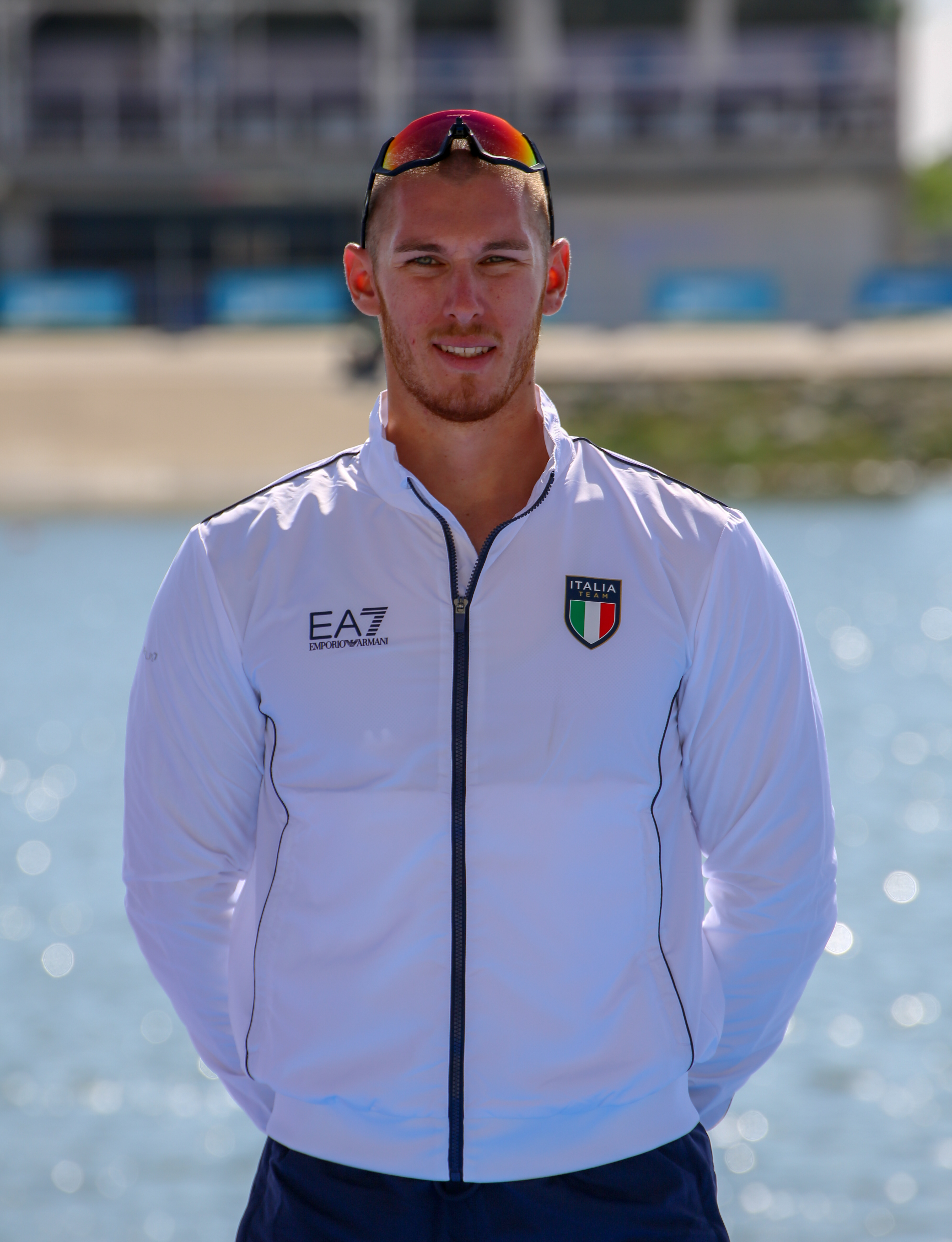 Luca Rambaldi, medalla de oro en los Juegos del Mediterráneo 2018